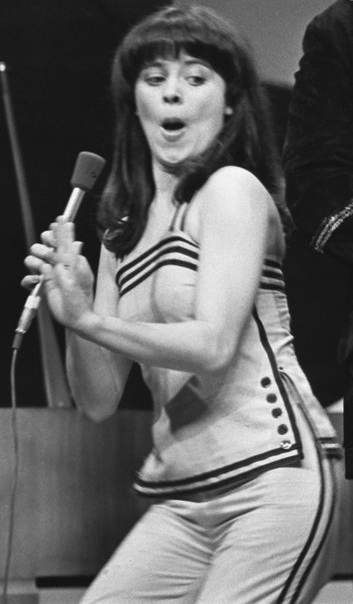 Finnish actress Titta Jokinen (current Leena-Maija Tunturi) (born 1951) Eurovision Song Contest in 1976.